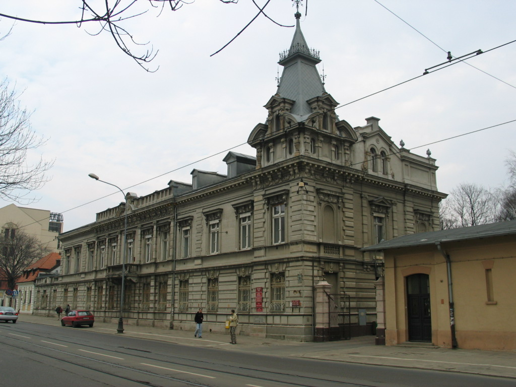 Pałac Scheiblerów przy Piotrkowskiej 266, obecnie siedziba wydziału Organizacji i Zarządzania PŁ